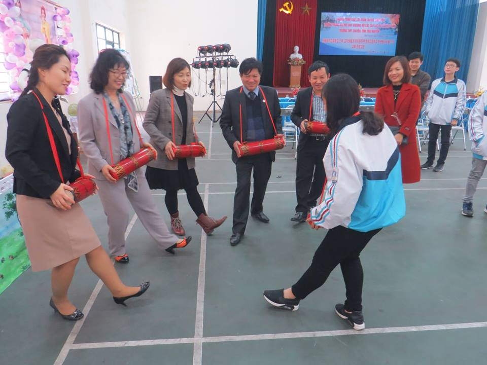 Hợp tác 2 trường